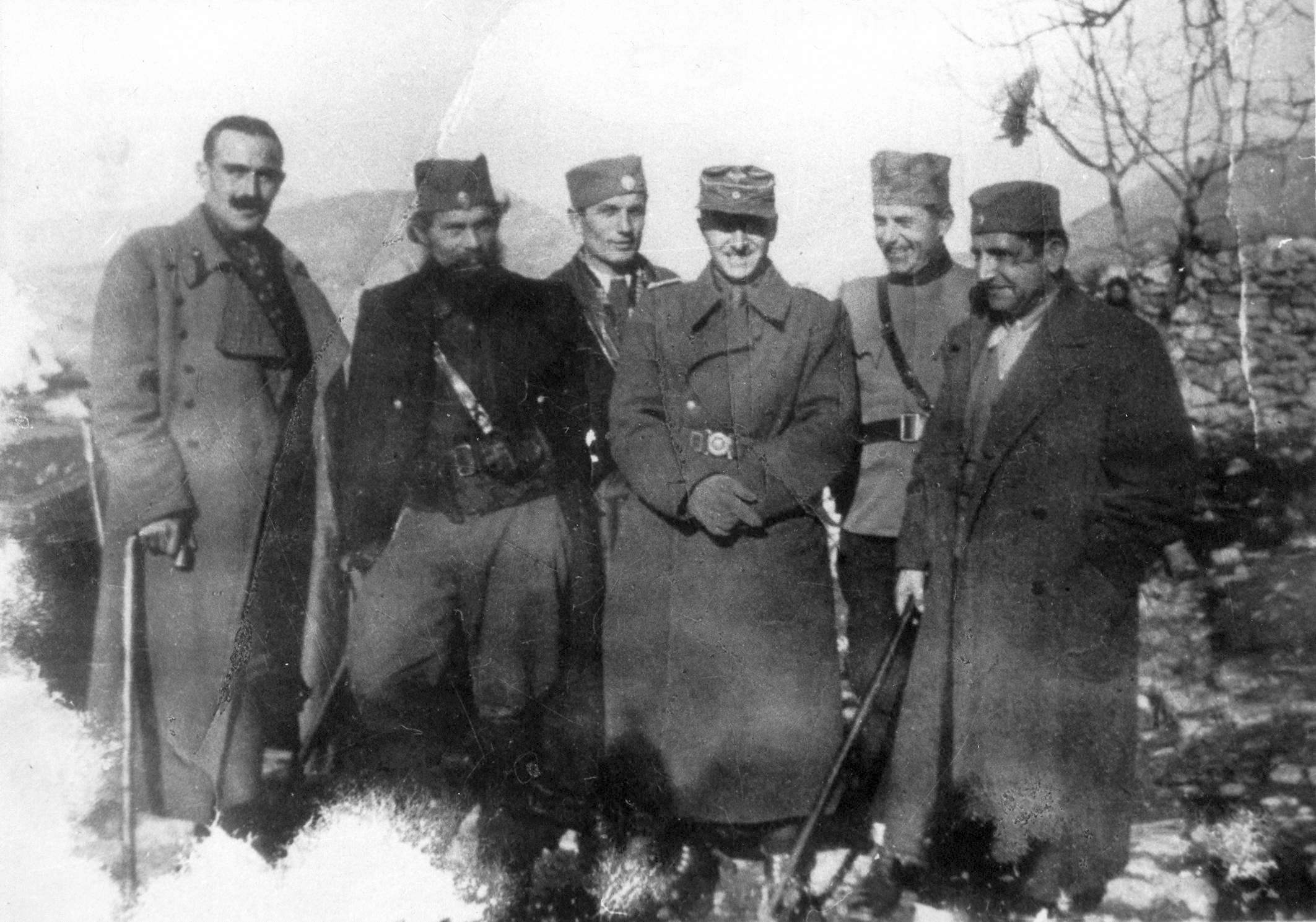 Srpskohrvatski / српскохрватски: Četnički komandanti i nemački okupatori u Podgorici 1944. Đorđije Lašić (prvi s desna), šef nemačke uprave za Crnu Goru pukovnik Hajnke (treći s desna) i Jakov Jovović (drugi s leva) u Podgorici, proleće 1944.